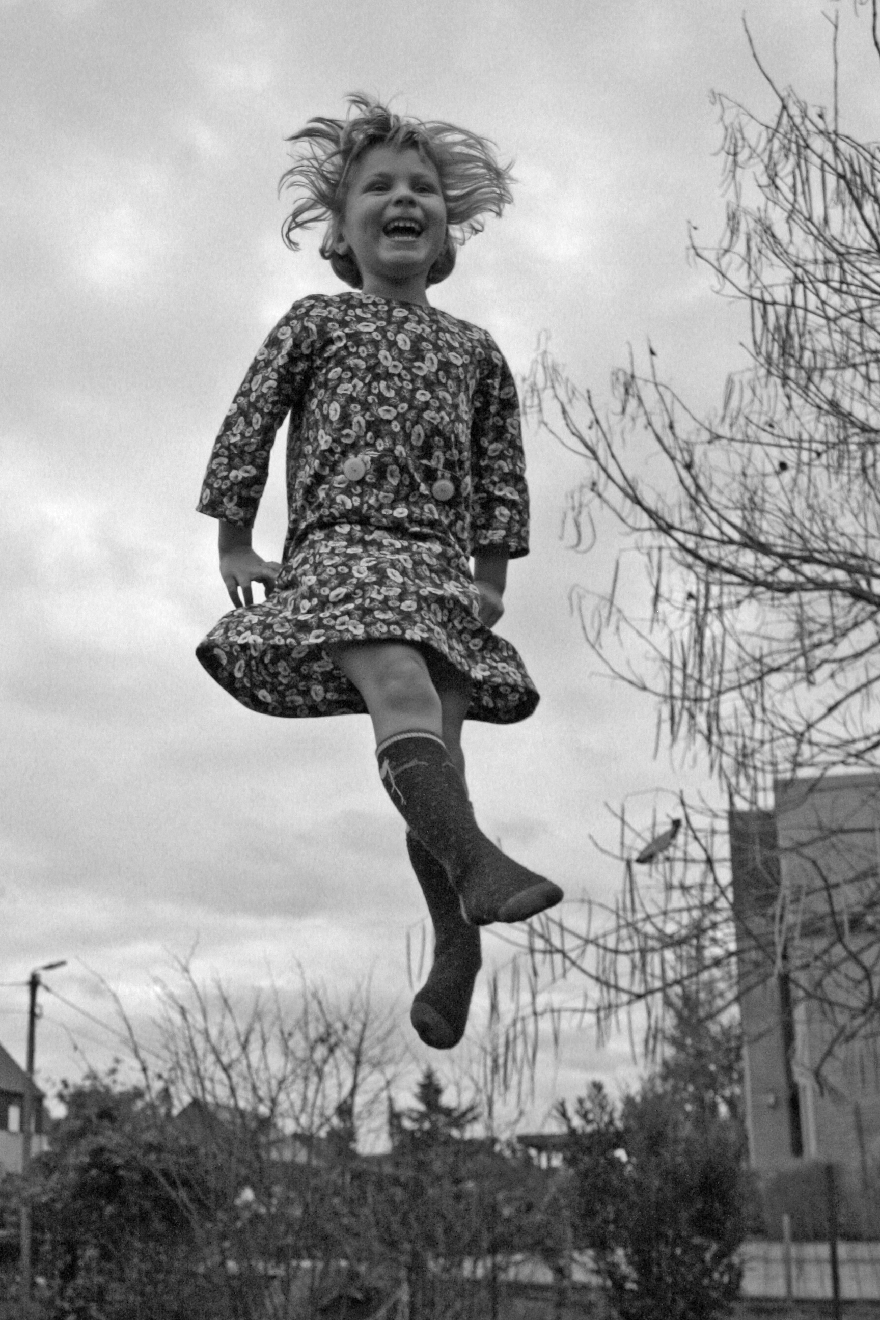 springen op de trampoline